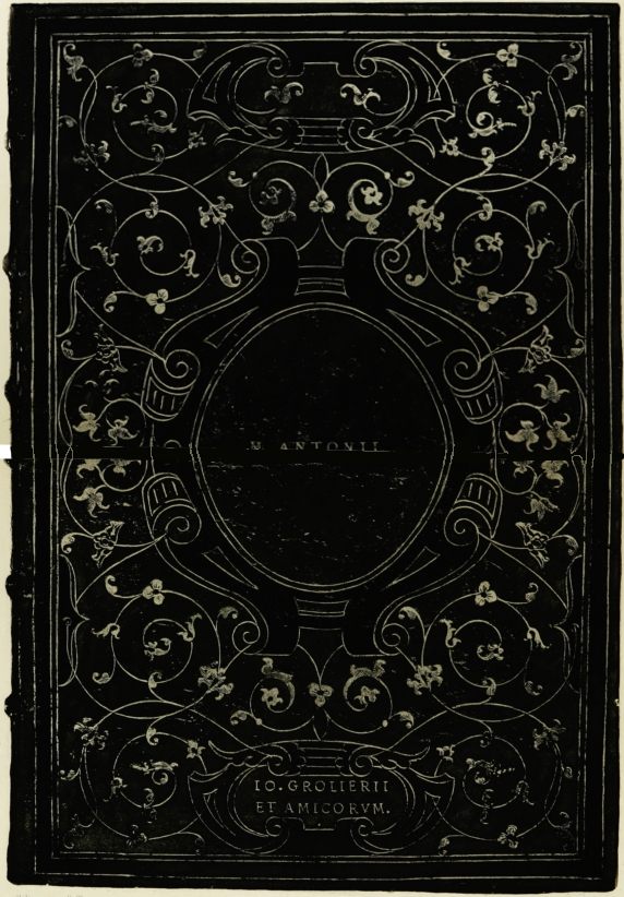 Illustration suite à la page 42 du livre La Reliure française depuis l’invention de l’imprimerie jusqu’à la fin du xviiie siècle de MM. Marius Michel (père et fils) Reliure portant le nom et la devise de Grolier.